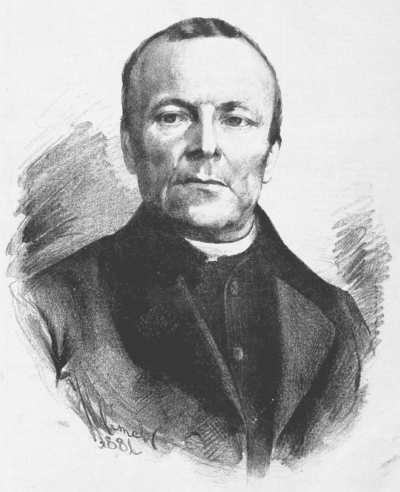 Portréty osobností od Jana Vilímka